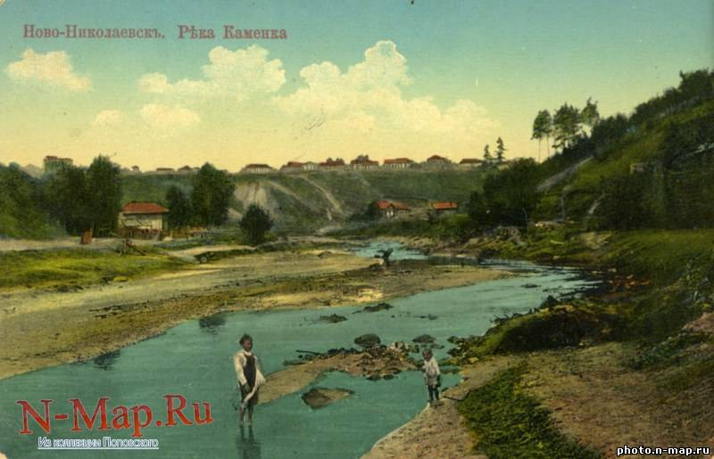 Hово-Николаевск. Река Каменка. Начало XX века